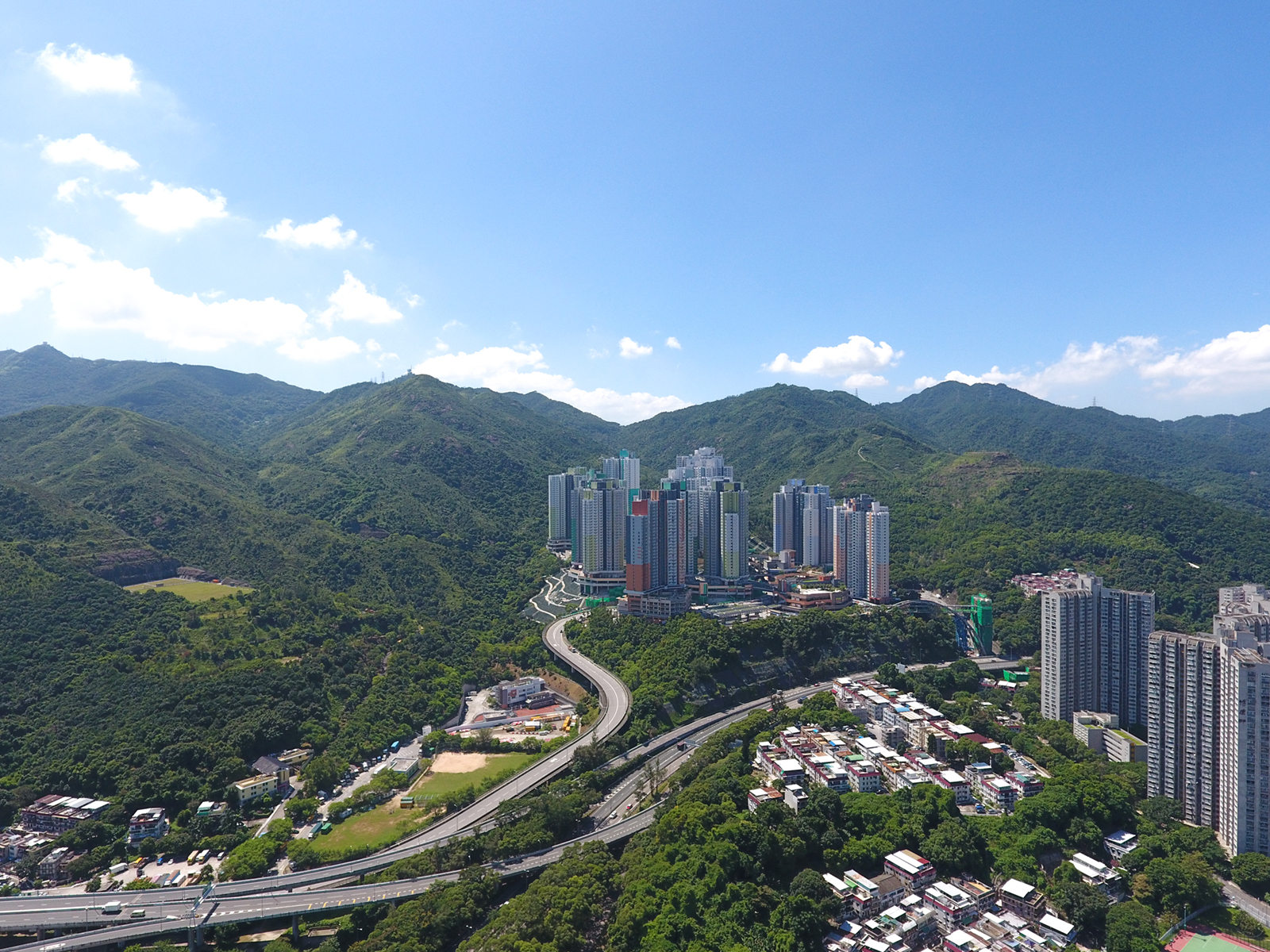 Shui Chuen O